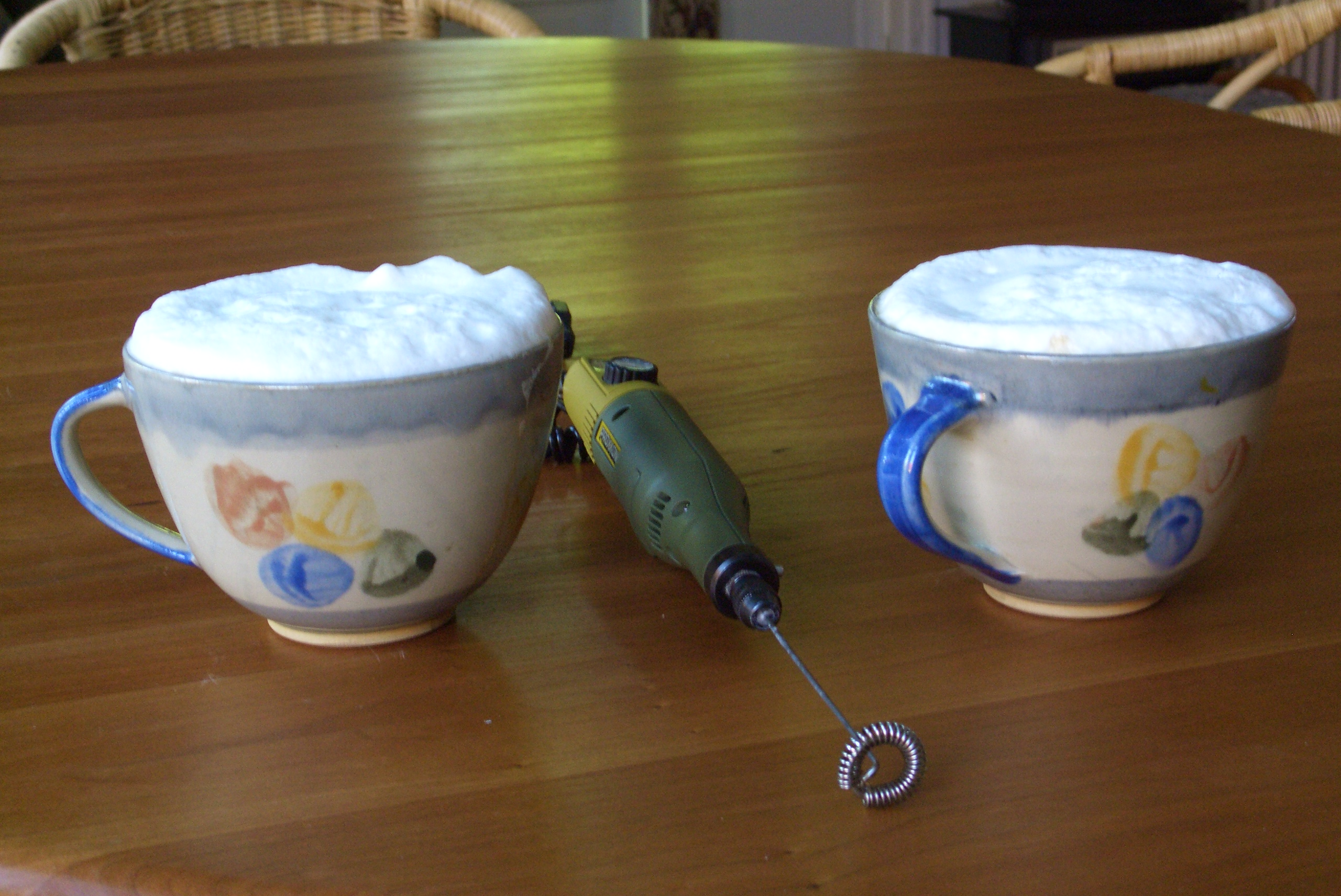 Zwei Tassen Capuccini und Milchschäumer